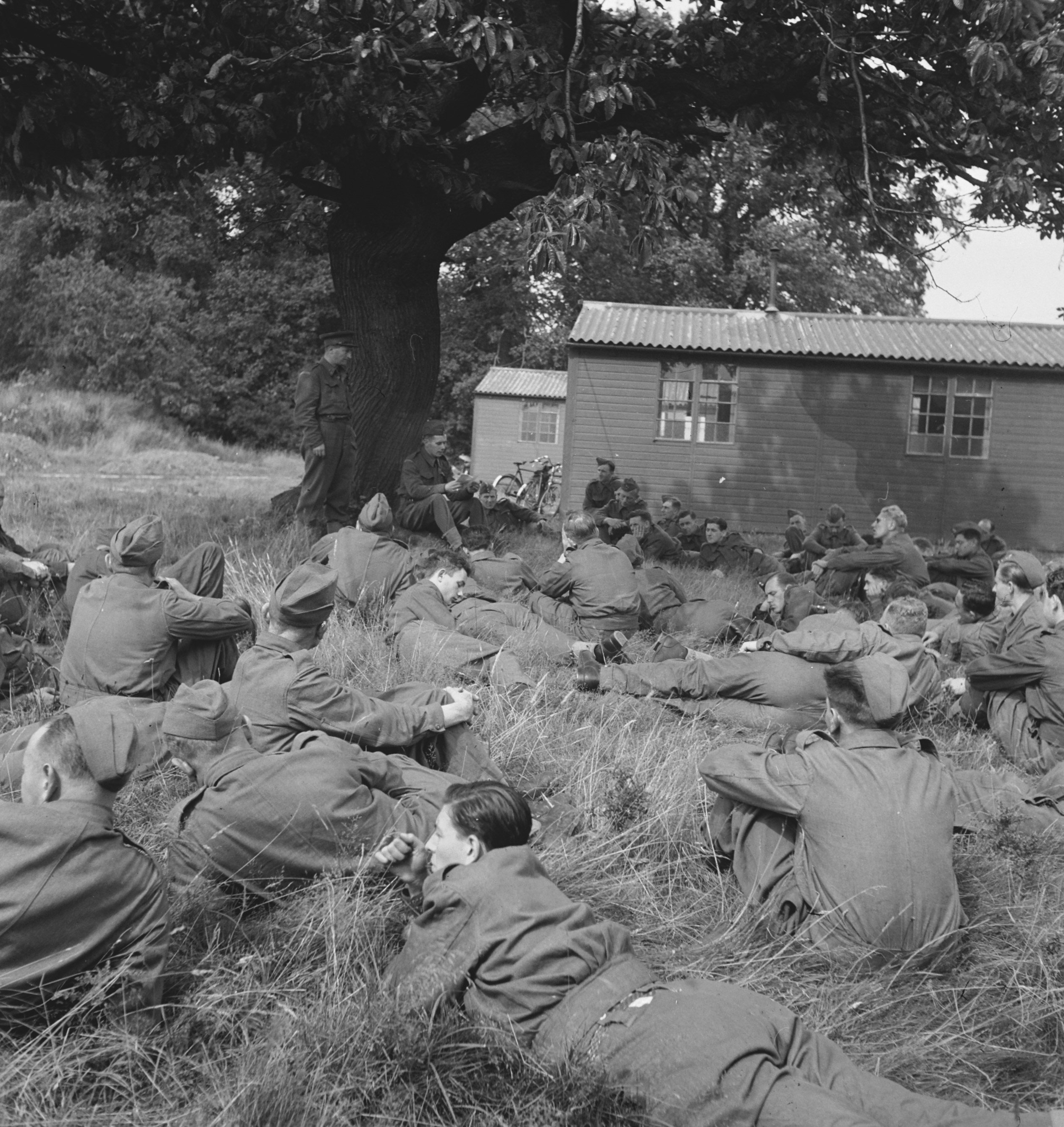 Collectie / Archief : Fotocollectie Anefo Reportage / Serie : ARMY [Army] Anefo Londen serie Beschrijving : Army 638 An A.B.C.A. Army Bureau of Current Affairs. discussion under the shadow of the trees. Lt. Gerzon supervising his company. Het Nederlandse Legerkamp in Wolverhampton. Het dagelijks leven in het Kamp. Een discussie over actuele zaken in de boomschaduw onder leiding van Lt. Gerzon. Annotatie : ABCA= Army Bureau of Current Affairs, onderdeel van het Britse leger was opgezet om militairen te scholen en het moreel te verbeteren, o.a. door het voeren van discussies. [bron: Datum : augustus 1943 Locatie : Groot-Brittannië Trefwoorden : kampen, leger, soldaten, tweede wereldoorlog Persoonsnaam : Gerzon, [...] Fotograaf : Onbekend / Publiek Domein, [onbekend] Auteursrechthebbende : Nationaal Archief Materiaalsoort : Negatief (zwart/wit) Nummer archiefinventaris : bekijk toegang 2.24.01.03 Bestanddeelnummer : 934-9494